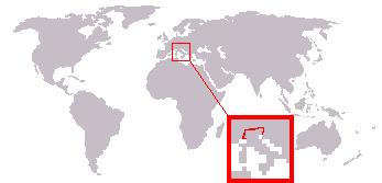 Bewerking afbeelding: afbeelding_(kaart).JPG